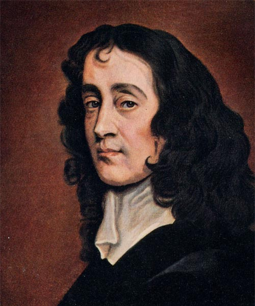 John Fell (clergyman) (1625-1686)